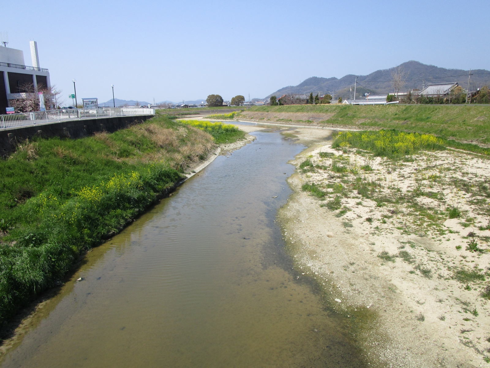 高瀬川（香川県三豊市、三野橋より撮影）